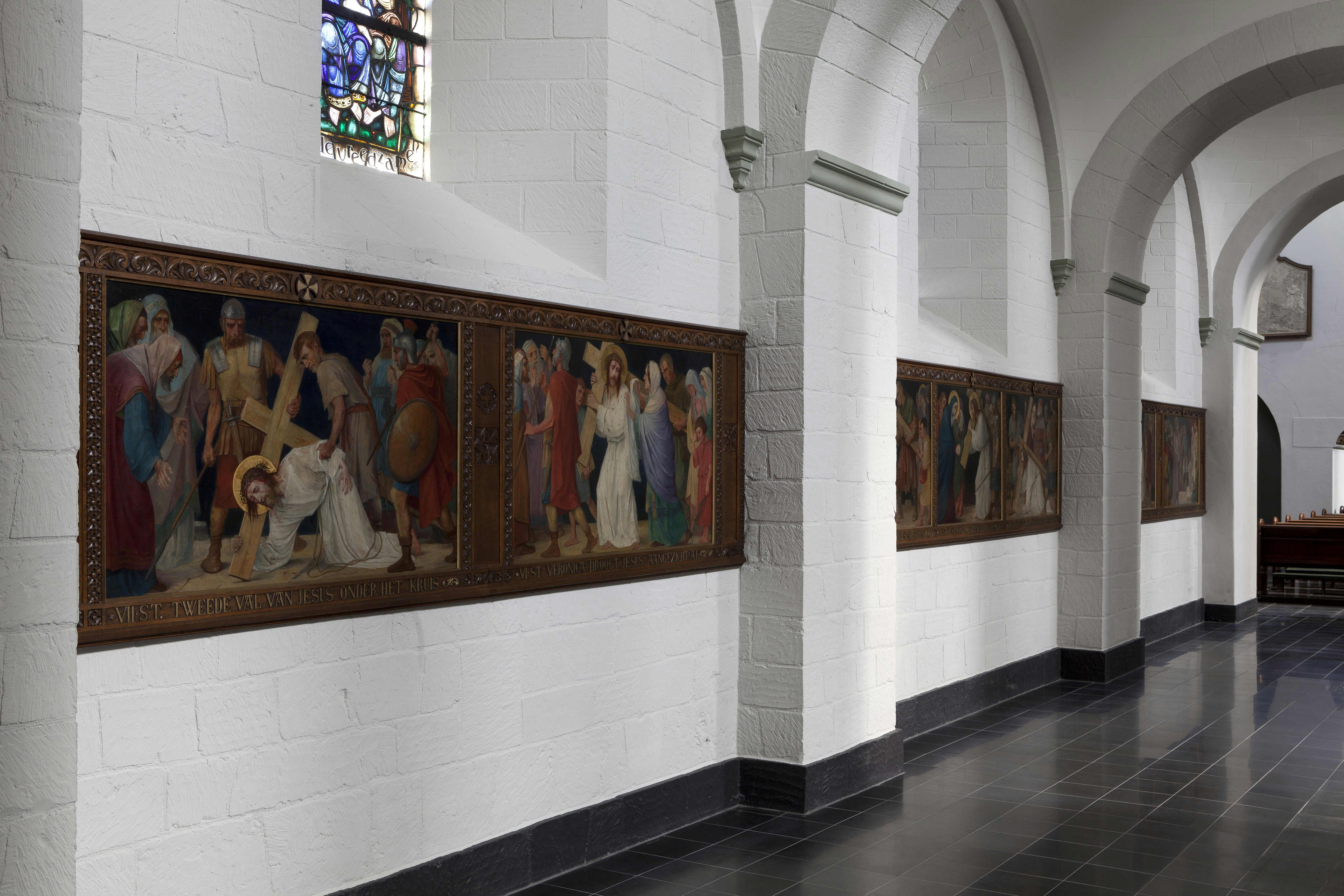 Sint Pancratiuskerk: Interieur, kruiswegstaties in de noordelijke zijbeuk (opmerking: Gemaakt voor publicatie "Sint Pancratius, in het hart van Heerlen")